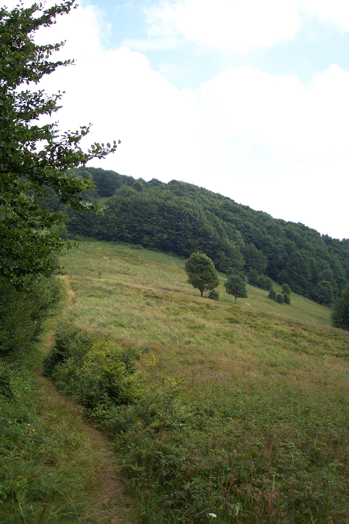 Stráň v přírodní památce Šípková. Slovensko.